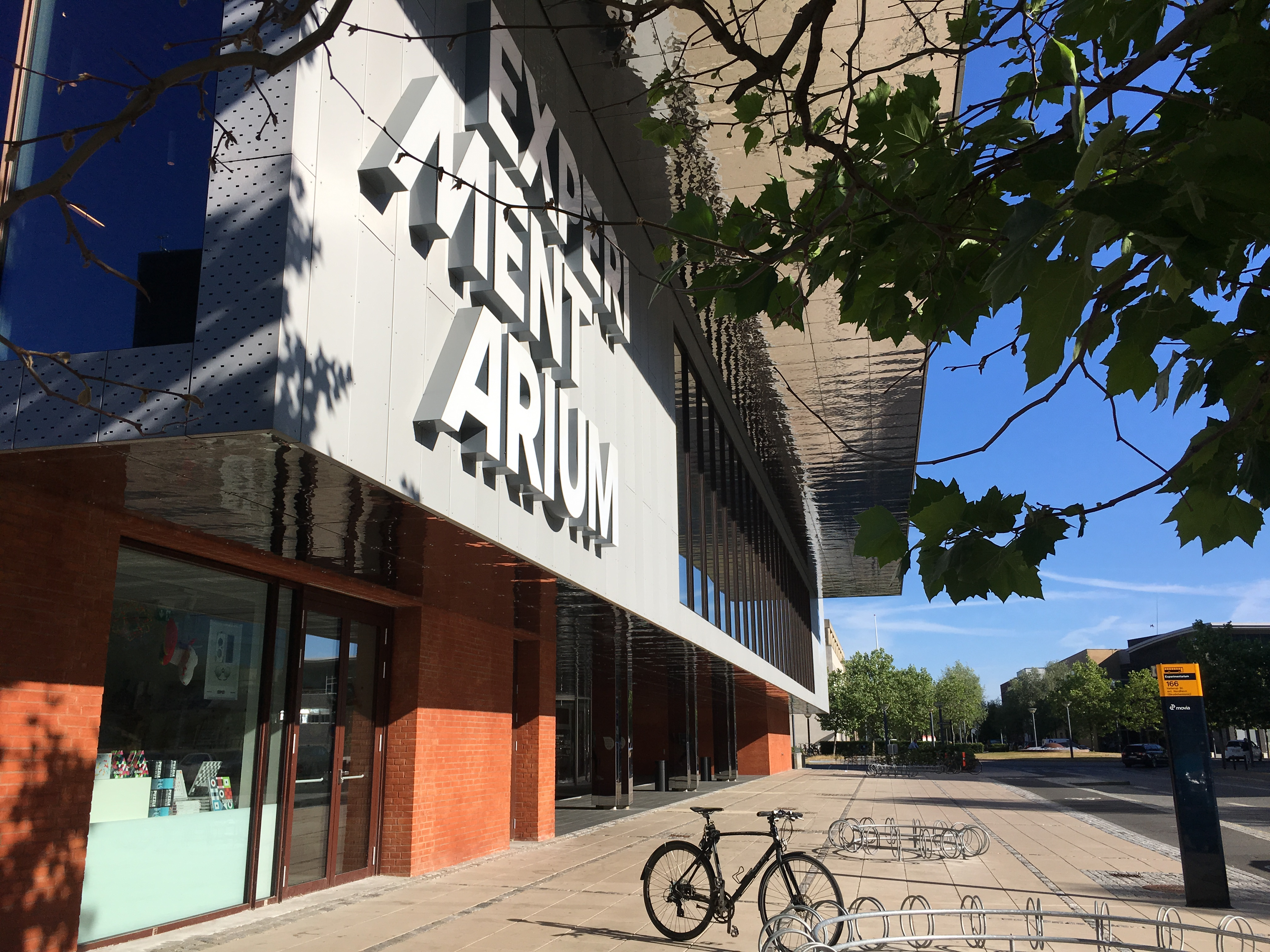 Entrance to Experimentarium, the science center in Hellerup, Denmark.